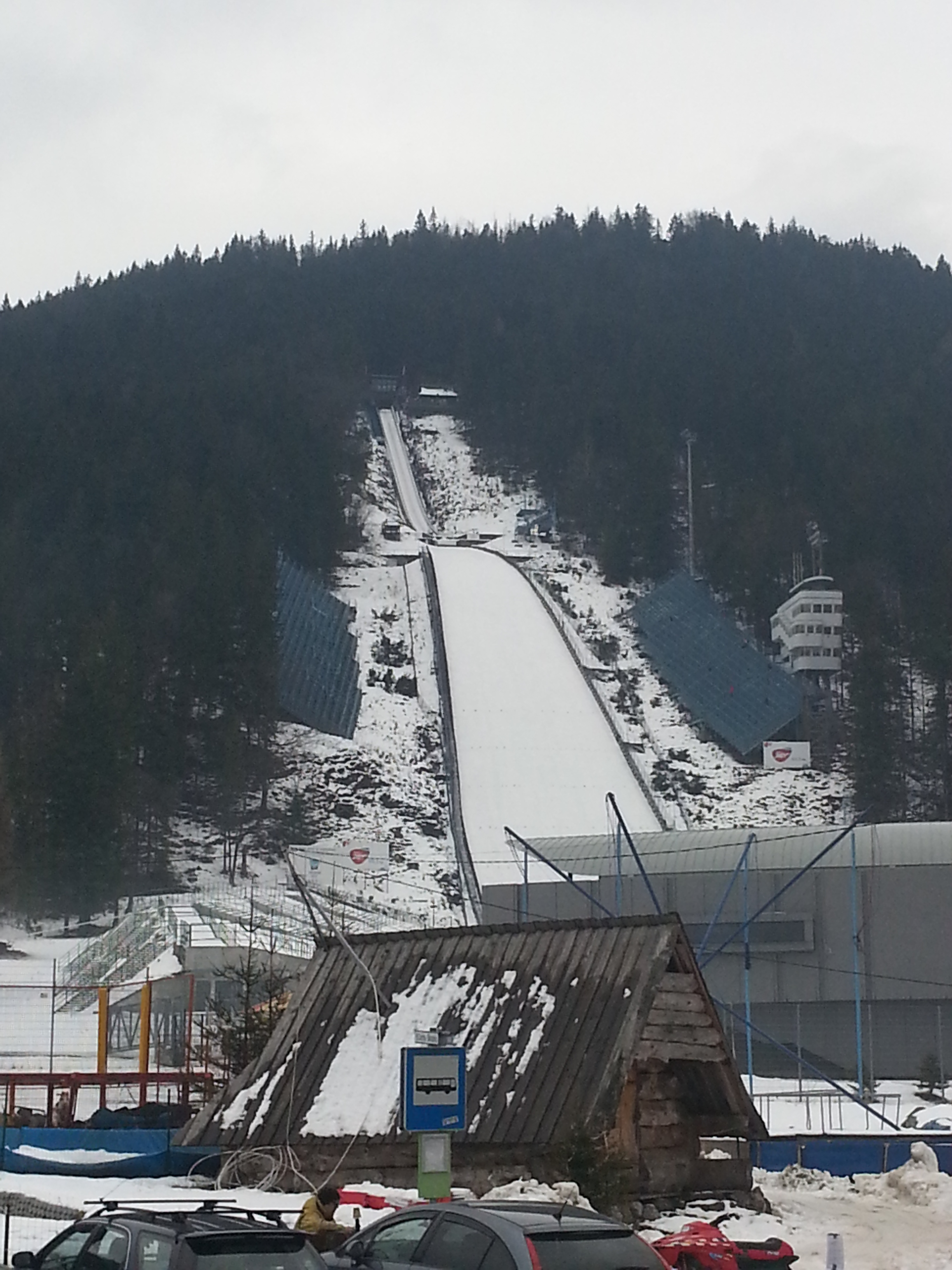 Wielka Krokiew, 2014 rok, widok z ulicy Bronisława Czecha